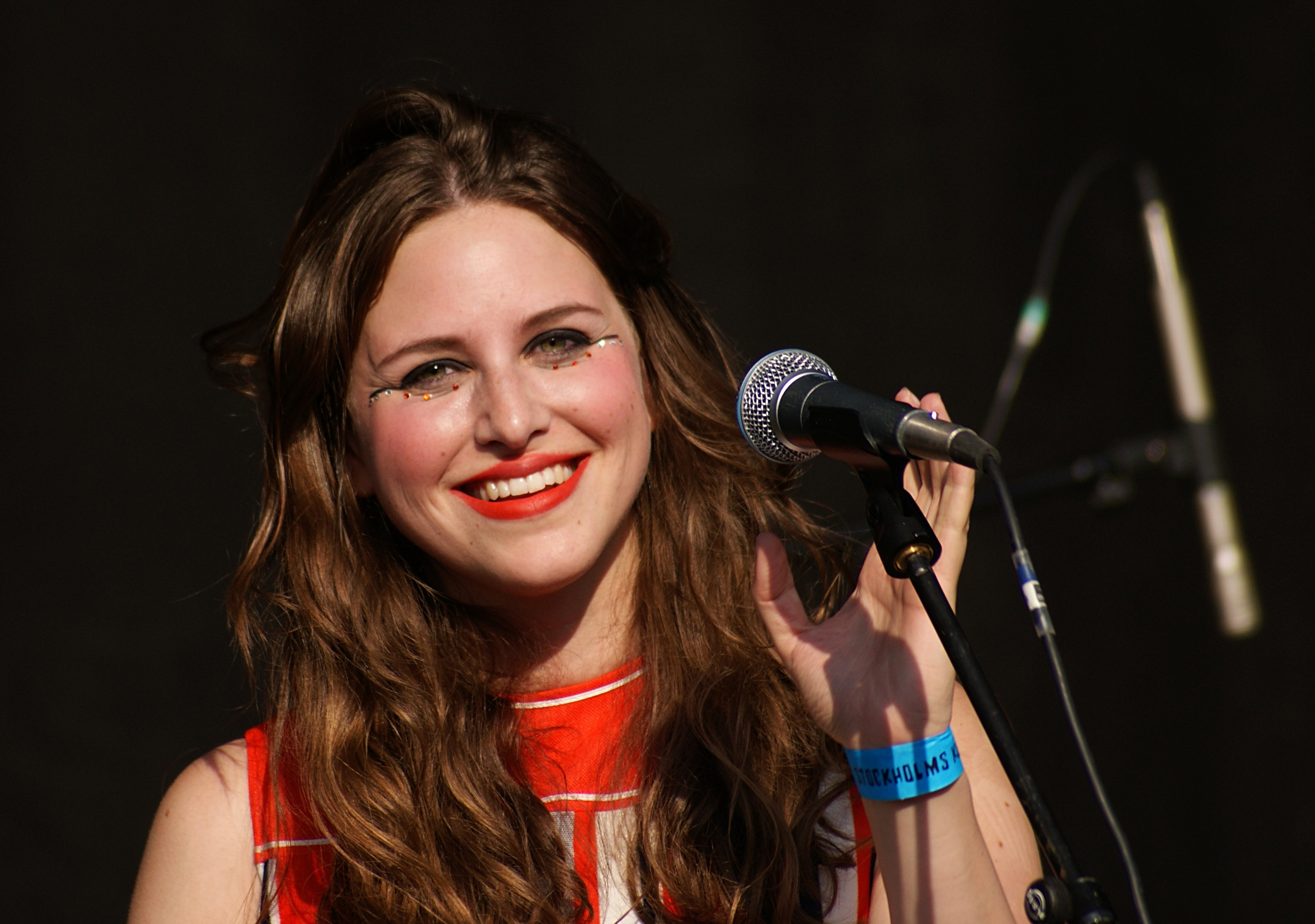 Fallulah på Roskildescenen på Stockholms Kulturfestival